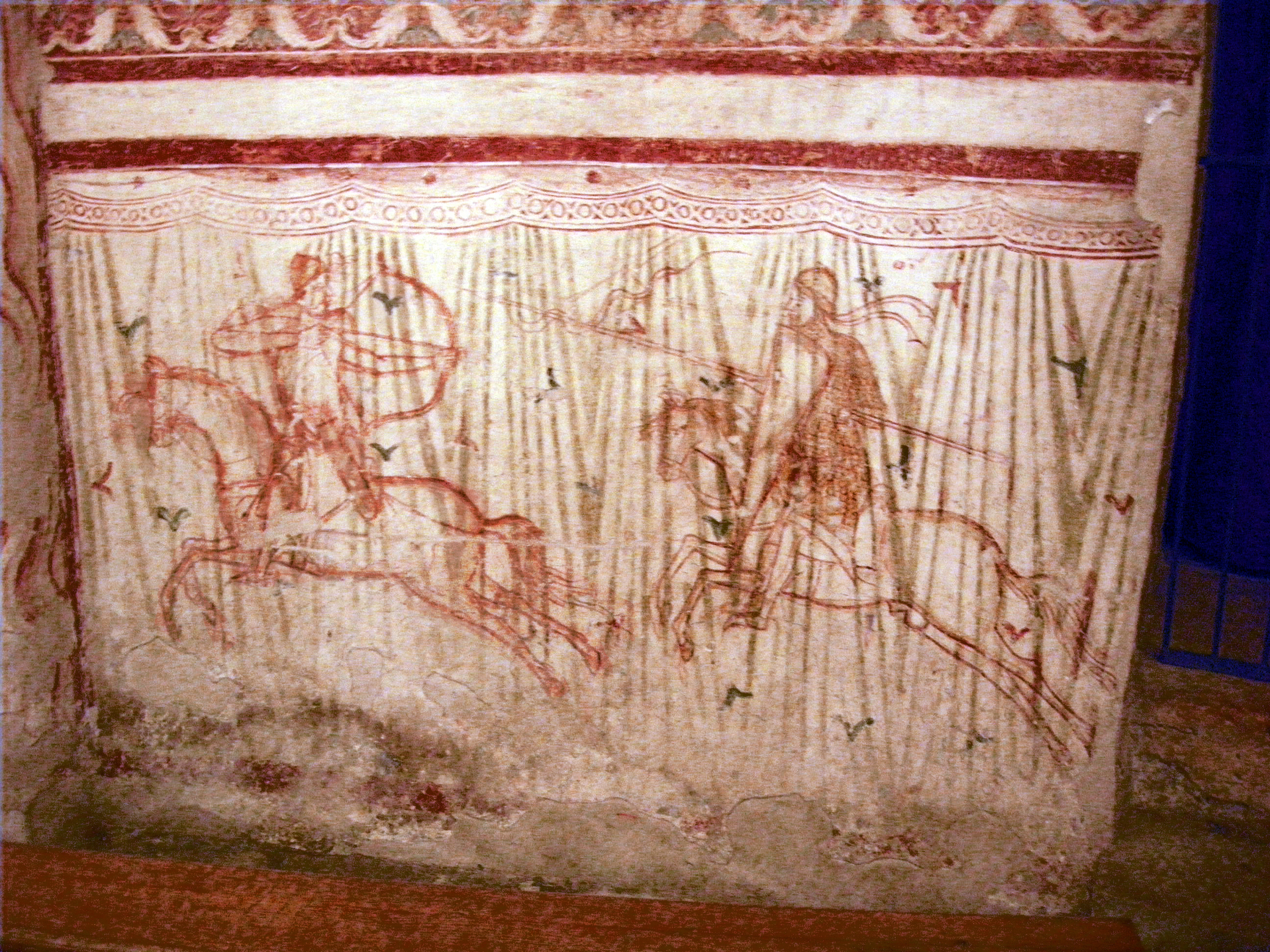 Basilica di aquilieia, cripta, affreschi registro inferiore